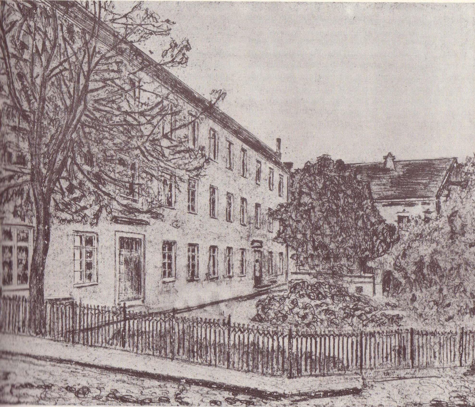 Zeichnung nach einer Fotografie des alten Gymnasiums zu Rastenburg (1817)